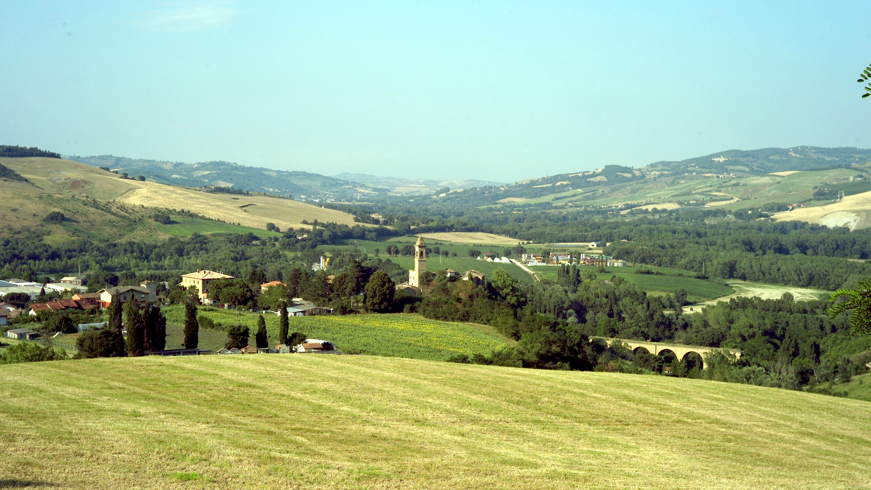 Veduta panoramica della frazione di Schieti, nel comune di Urbino.